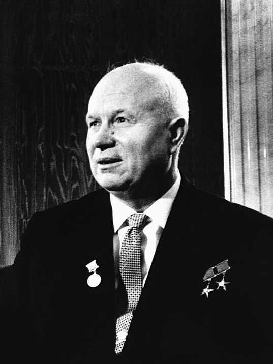 Soviet Premier Nikita Khruchchev in Vienna. depicted person: Nikita Khrushchev (age: 67)